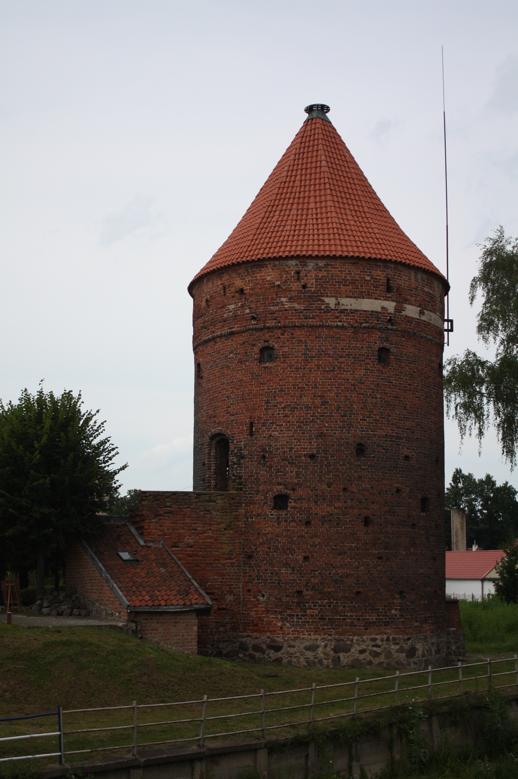 Dobre Miasto, ul. Sowińskiego - Baszta Bociania, XIV-XV You can see all photographs in category Wikiekspedycja 2012. The making of this document was supported by Wikimedia Polska.